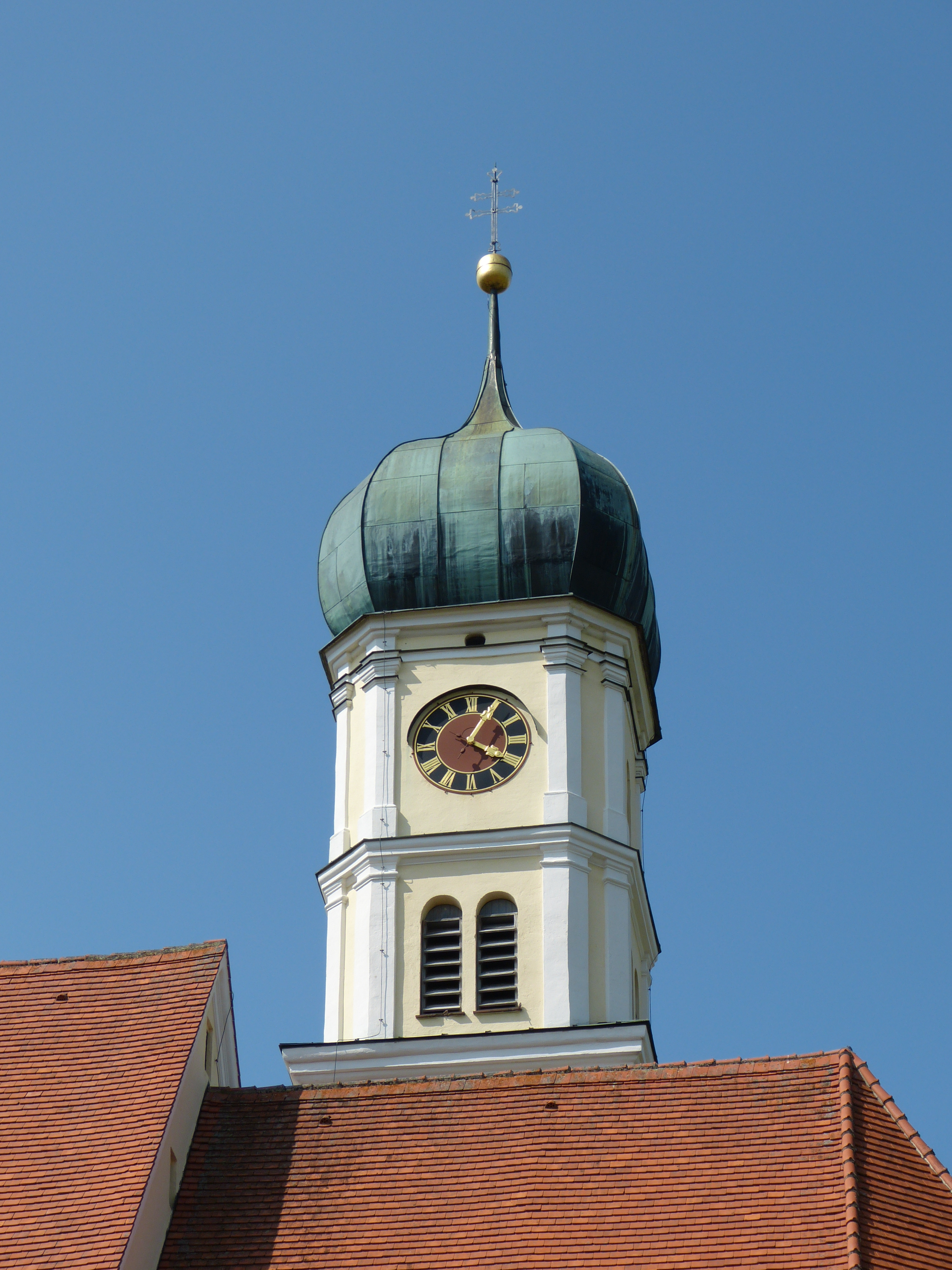 St. Georg, Kirch-Siebnach bei Ettringen, Landkreis Unterallgäu, Bayern, Deutschland